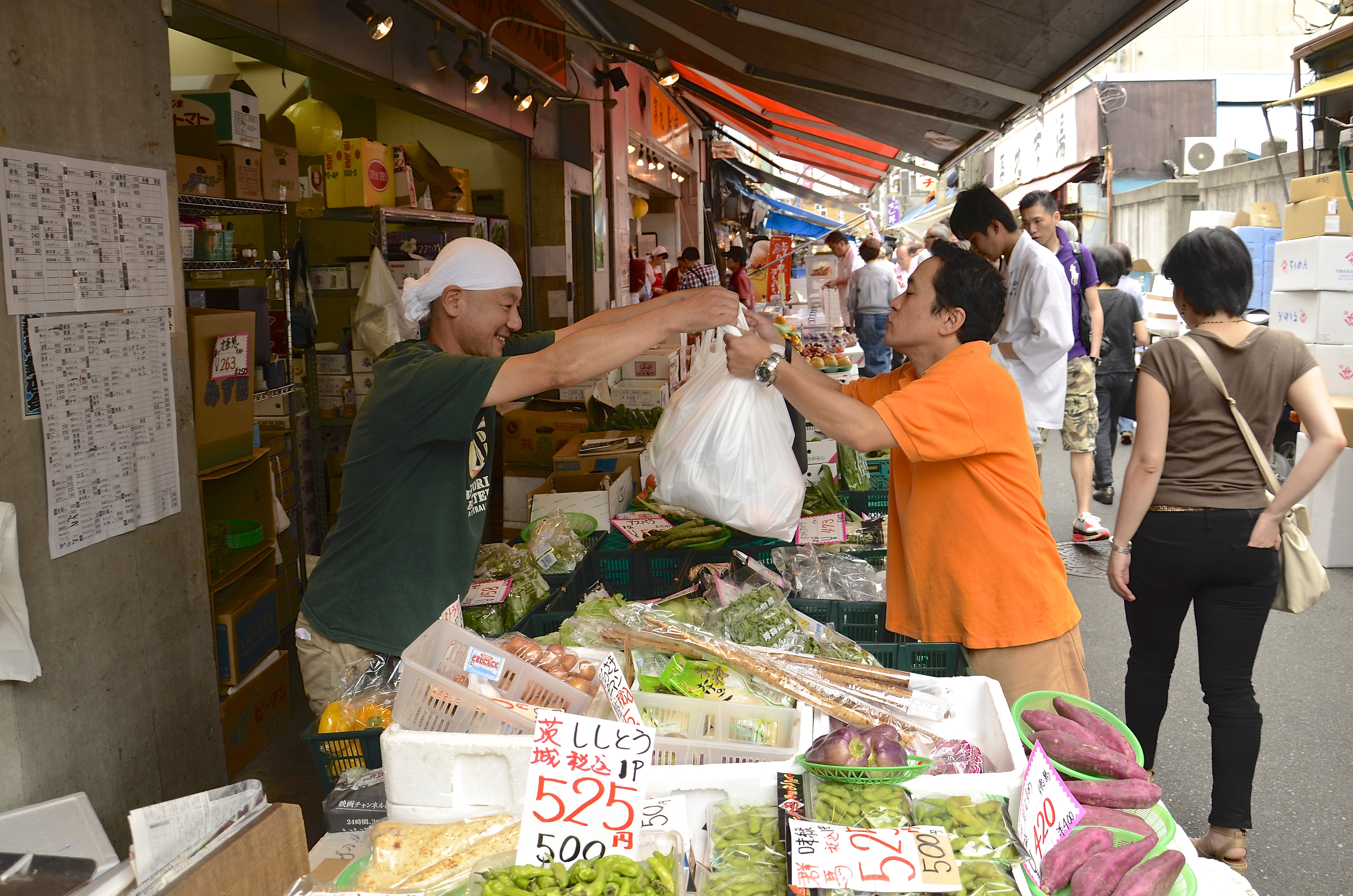 Business As Usual, Tsukiji Fish Market